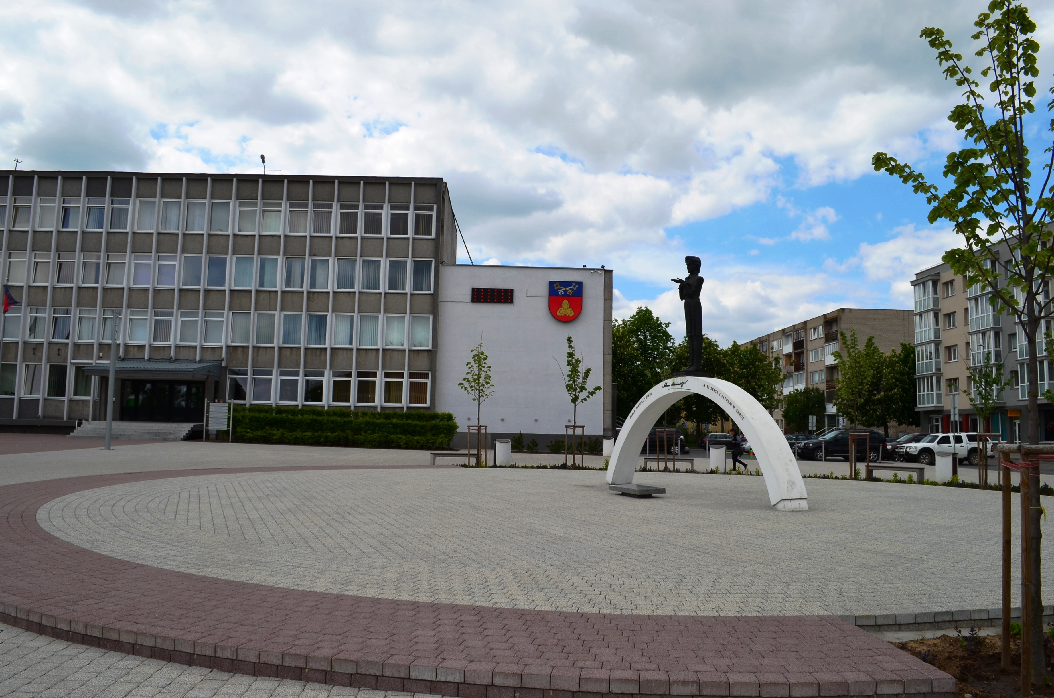 Šalčininkų centras, savivaldybė